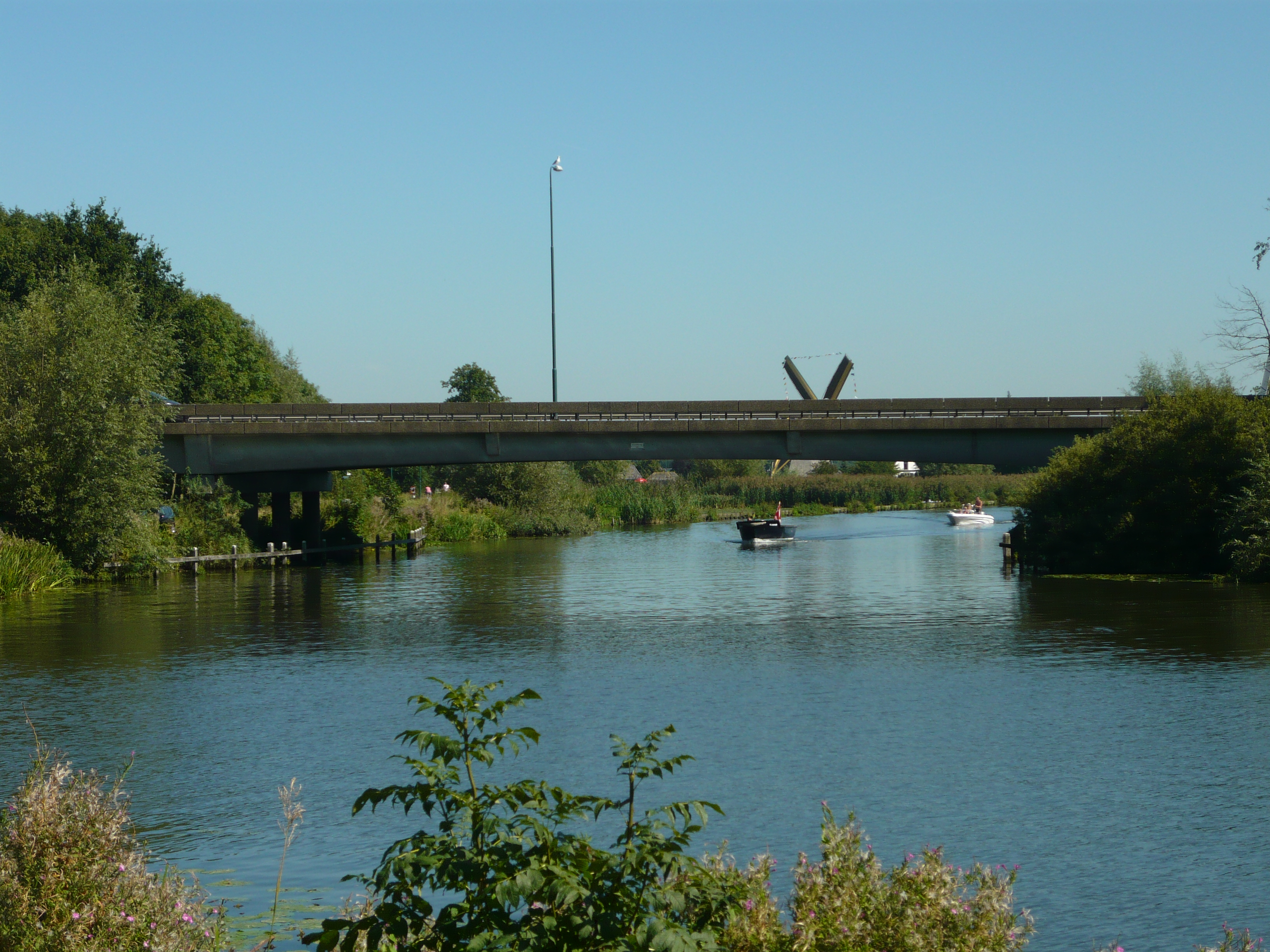 De Hoekbrug over de Vecht is een moderne verkeersbrug tussen Oud-Zuilen en Maarssen. Het betreft een vaste brug uit gewapend beton in de Sweserengseweg ((voormalige) provinciale weg 404).